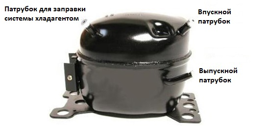 Компрессор бытового холодильника (русская версия уже имеющегося файла с данными на французском)